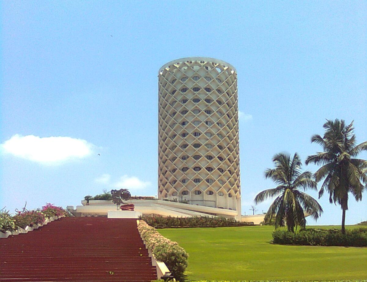 नेहरु सेन्टर